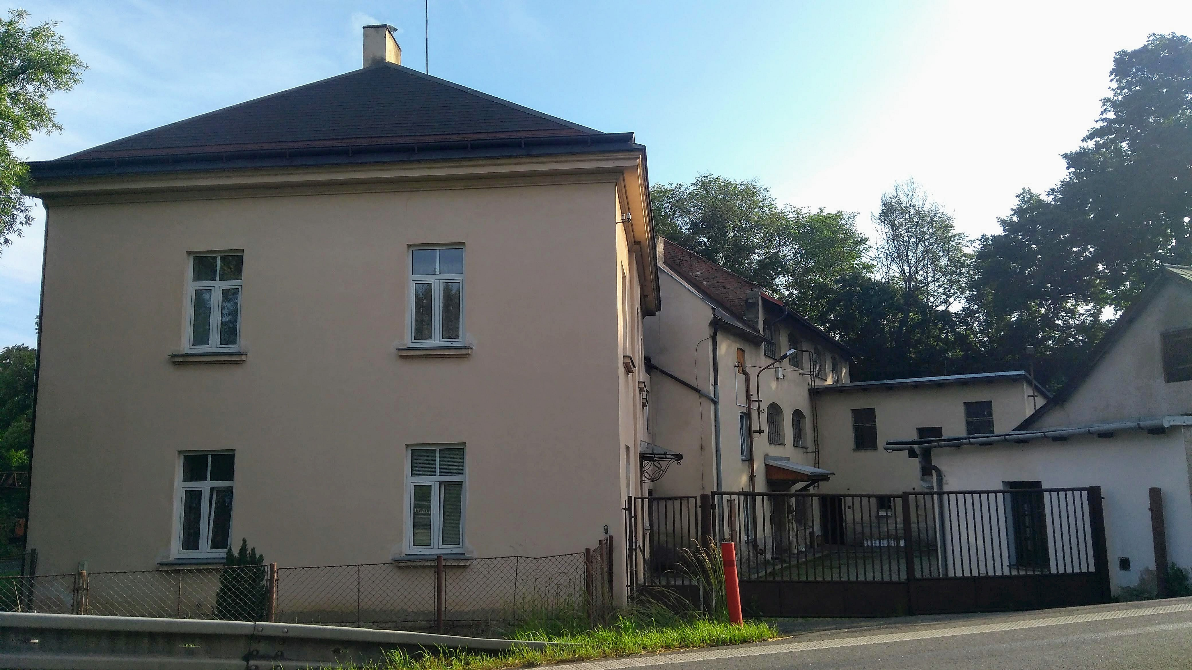 Skržice 14, (osada Olšina) Soběsuky, bývalý mlýn a pila